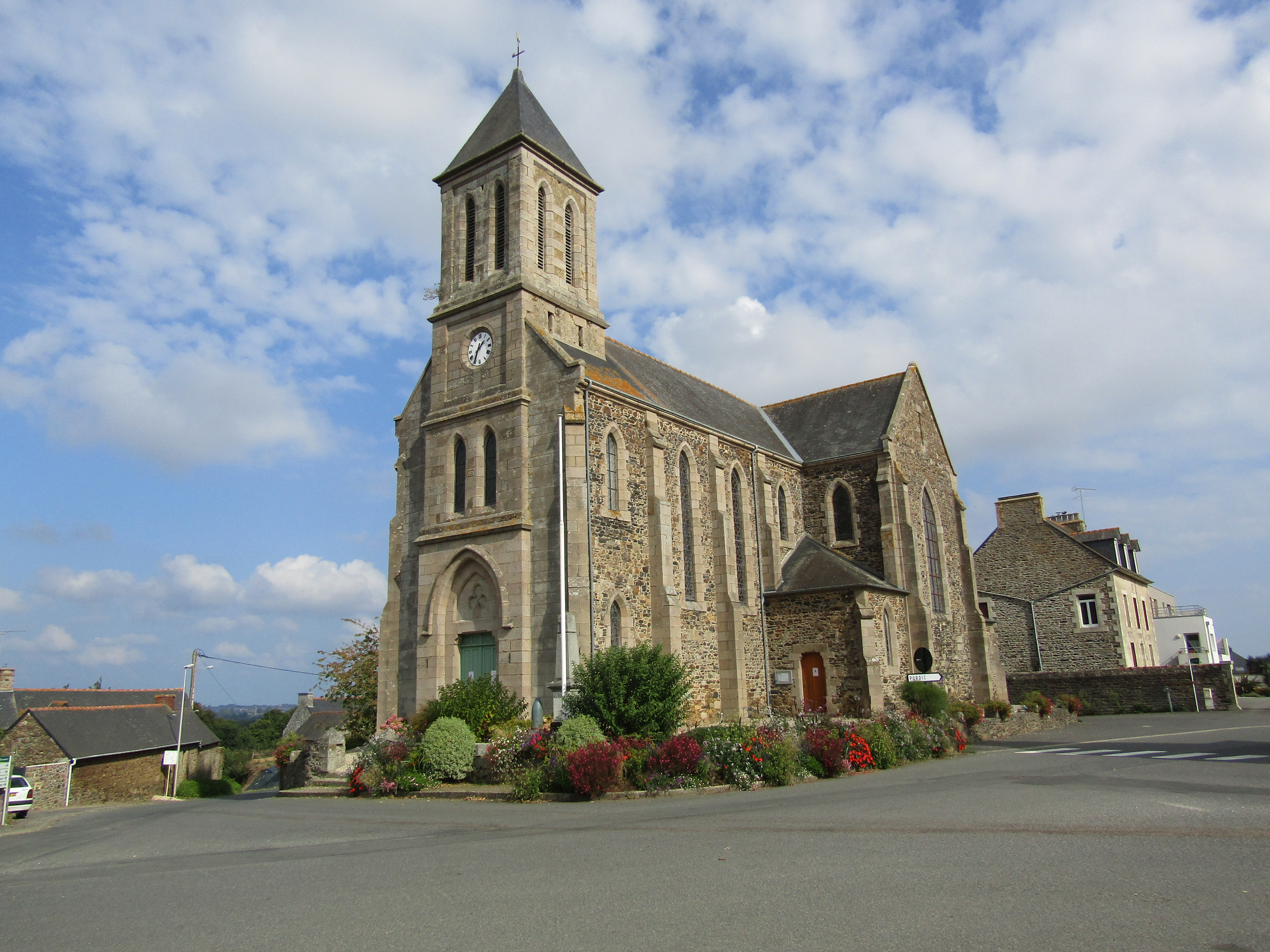 L'église Saint-Méloir de Tréméloir